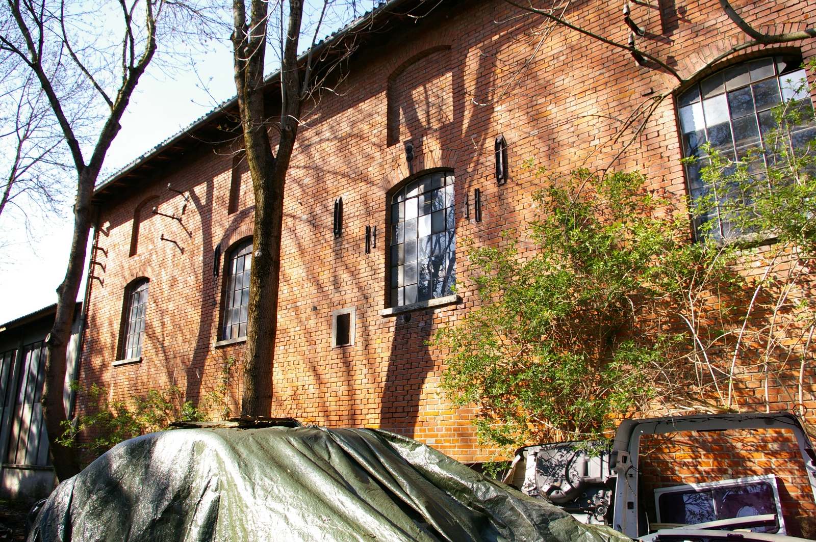 Historische Fabrikanlage der "Hausmullverwertung München GmbH". Teilansicht der 1902 in zeittypischer Industriearchitektur errichteten Superphosphatfabrik. Aufnahme 2008